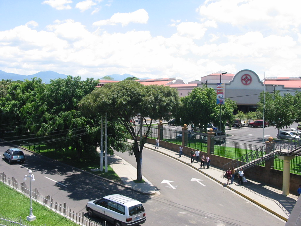 Metrocentro de la ciudad de Santa Ana, El Salvador.